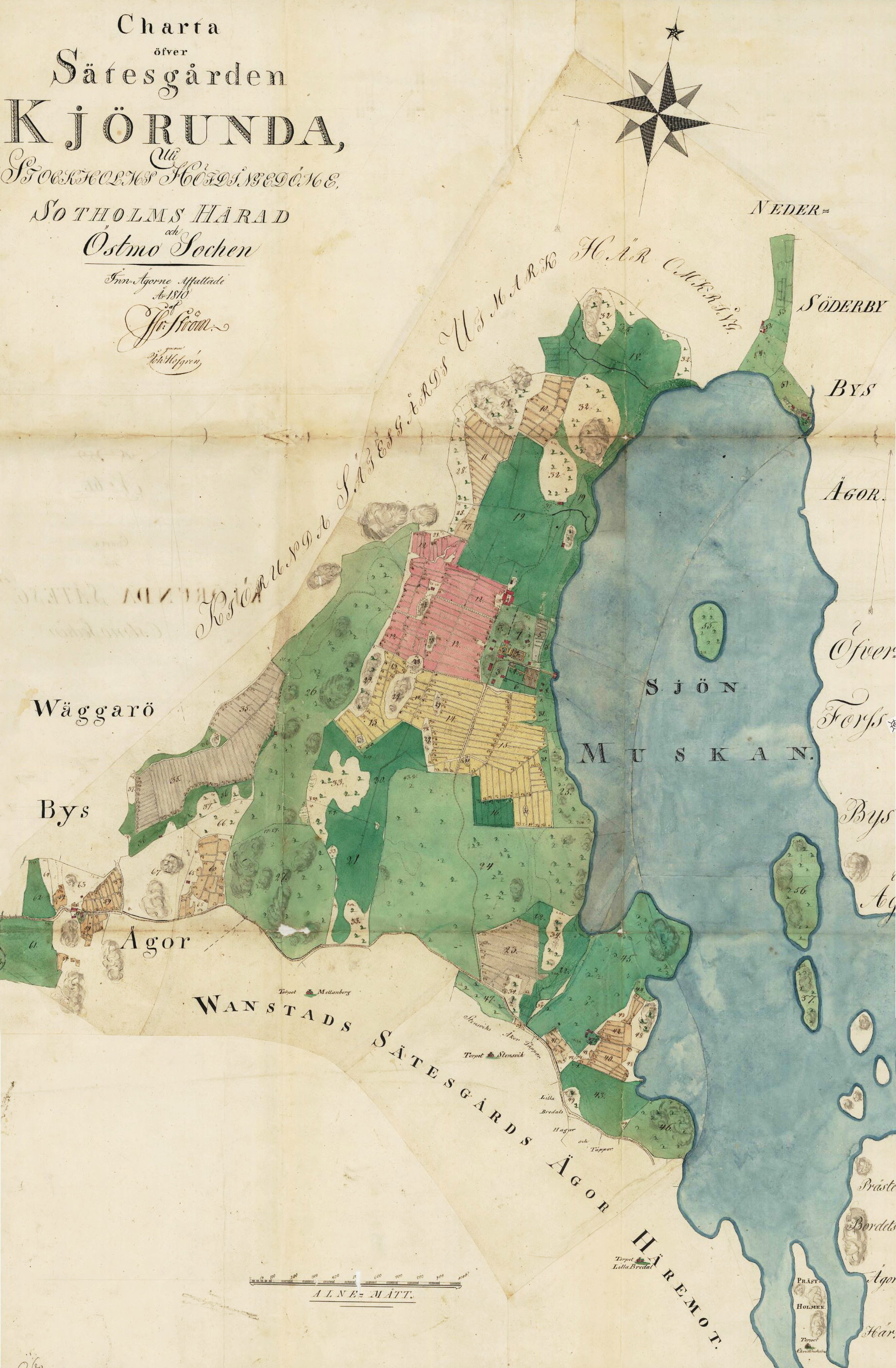 Charta öfver Sätesgården Kjörunda